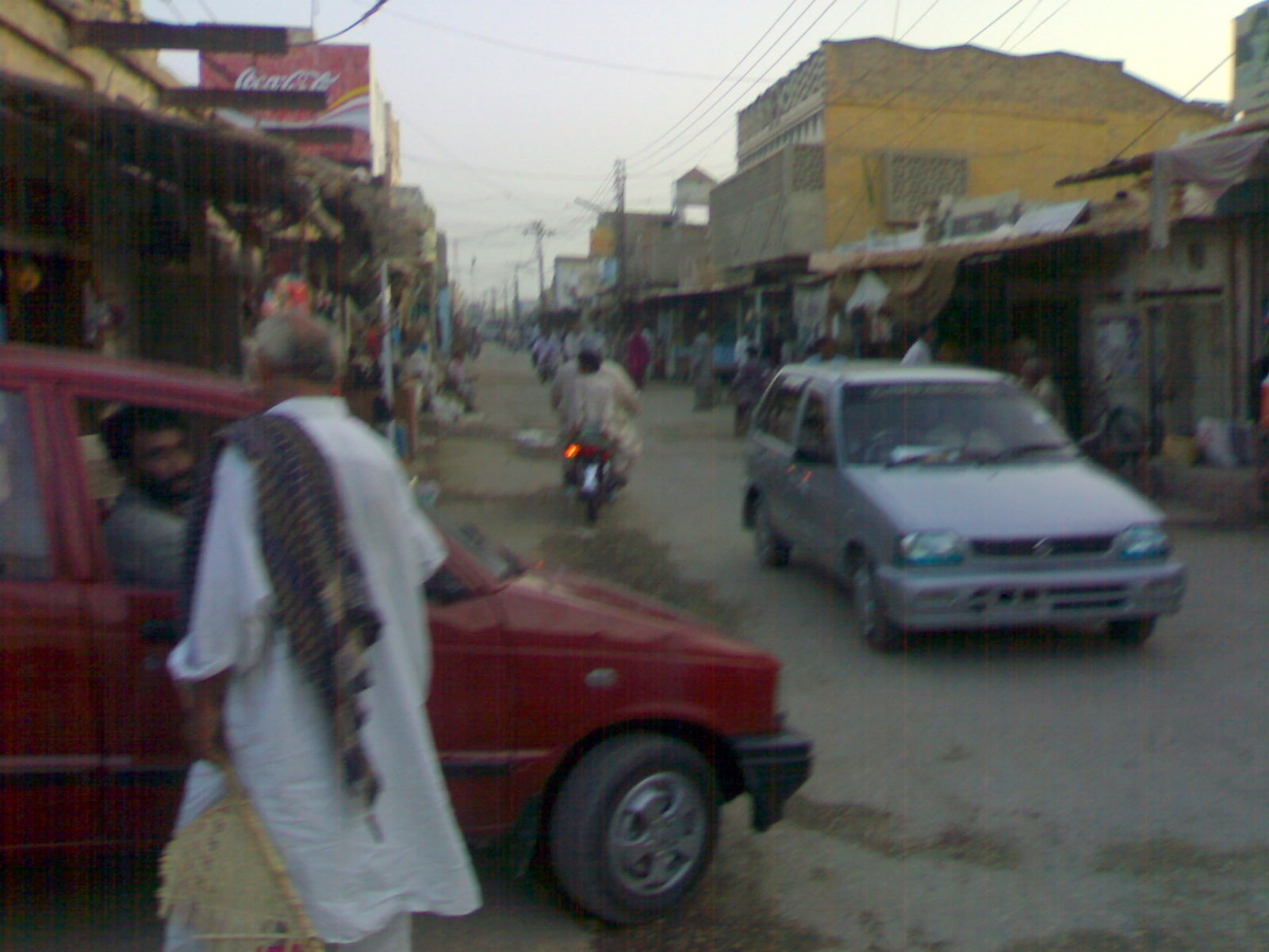 Bazar